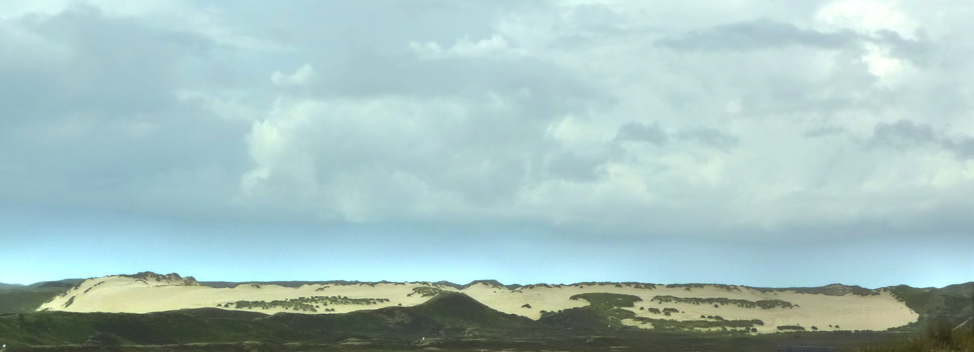 Sütterknoll-Düne auf Sylt